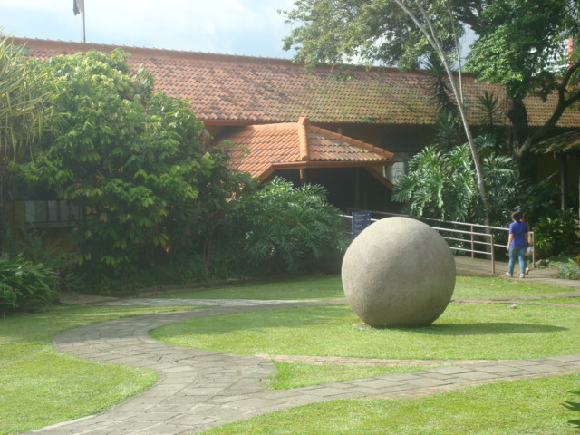 Esferas de piedra precolombinas en el patio del Museo Nacional de Costa Rica.